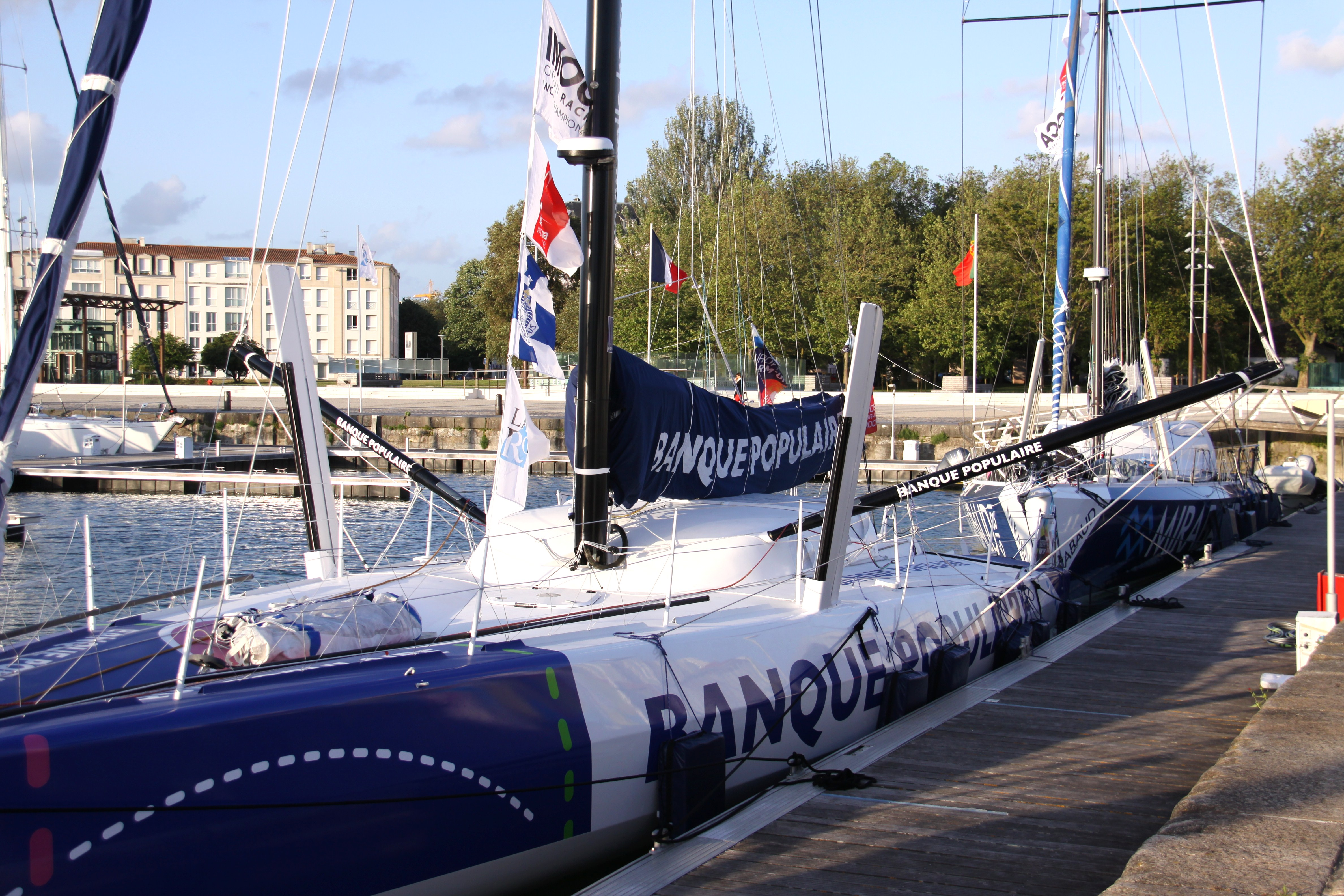 Le voilier le course Open 60 de classe IMOCA « Banque Populaire » dans le Bassin des Chalutiers à La Rochelle, lors de l’ Europa Warm’ Up Race en 2012. La Rochelle fut la ville arrivée de cette course. Le « Banque Populaire » a été lancé en 2010. Ce bateau fut troisième dans l’ Europa Warm’ Up Race et second de la course à la voile autour du monde Vendée Globe 2012-2013. Skipper: Armel Le Cléac’h. La Rochelle, Charente Maritime, France.